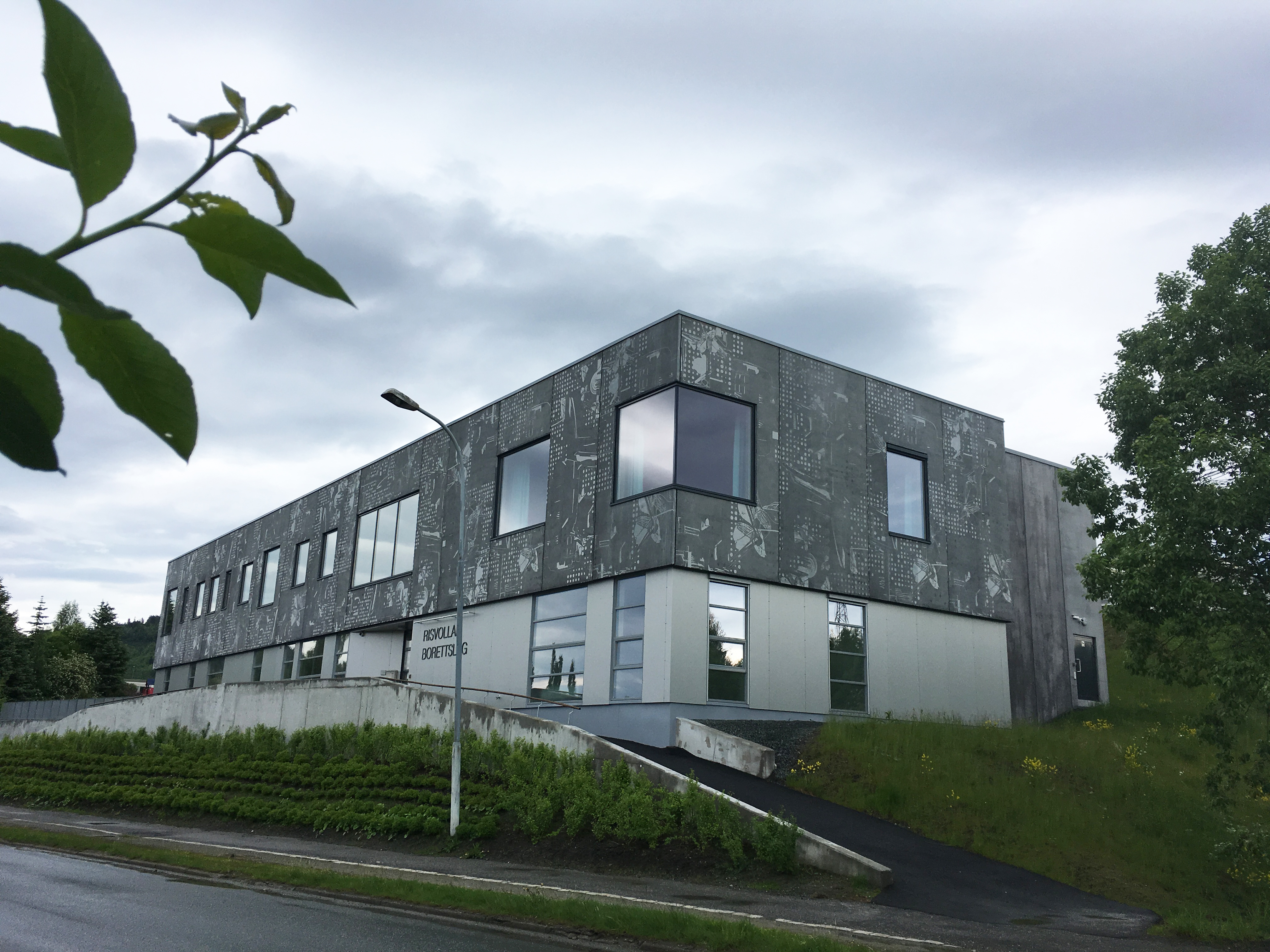 Risvollan borettslags administrasjonsbygg. Bygget 2013–2015. Arkitekt Pir II.